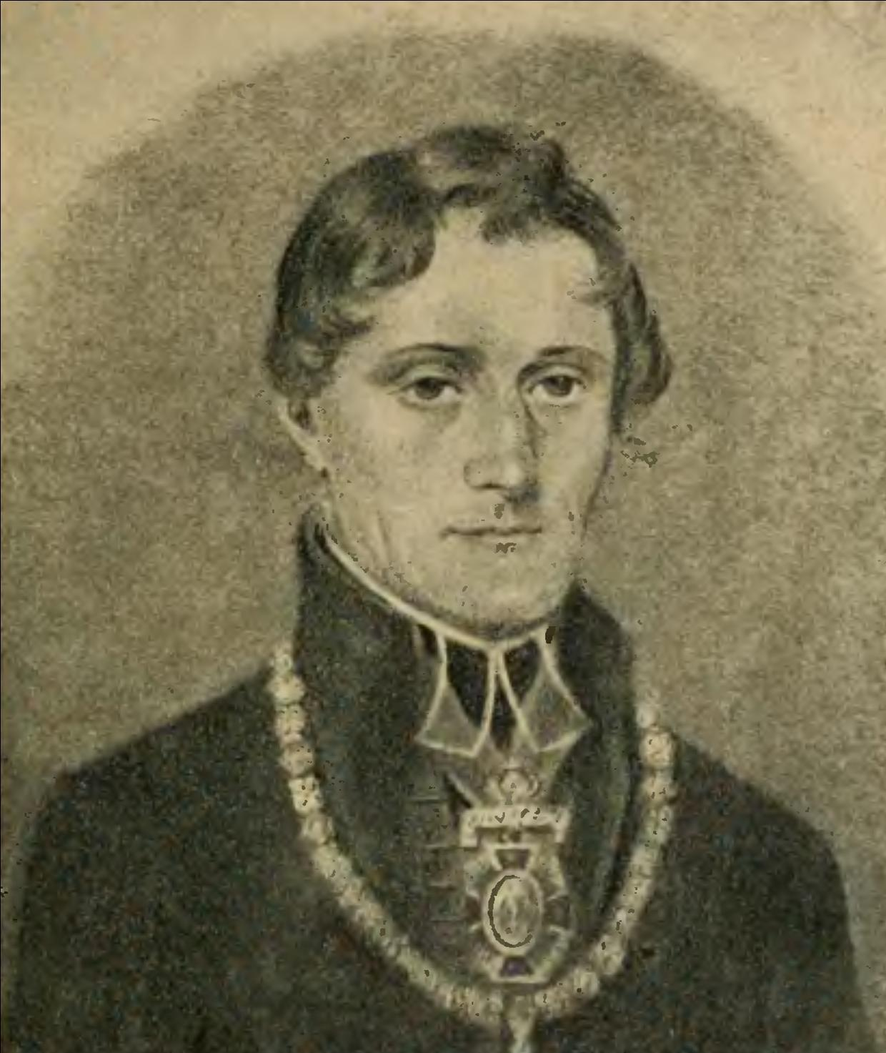 Онуфрій Криницький (1791-1867) — український церковний і громадський діяч, греко-католицький священик, педагог, тричі ректор Львівського університету